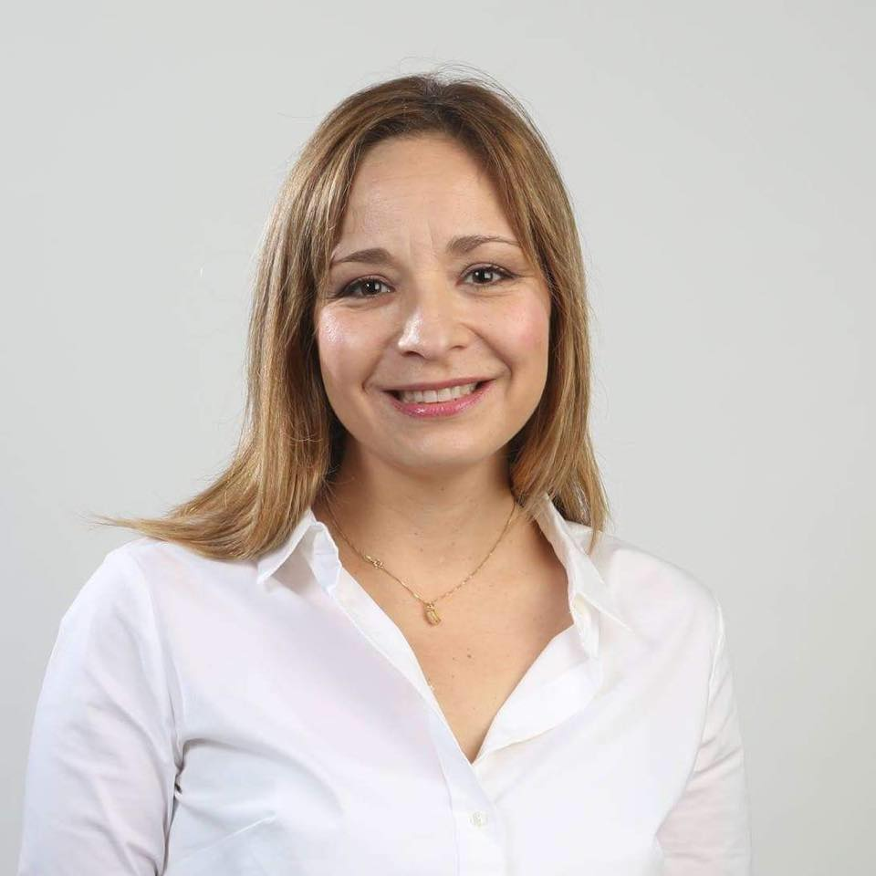 Lucía Pinto Ramírez